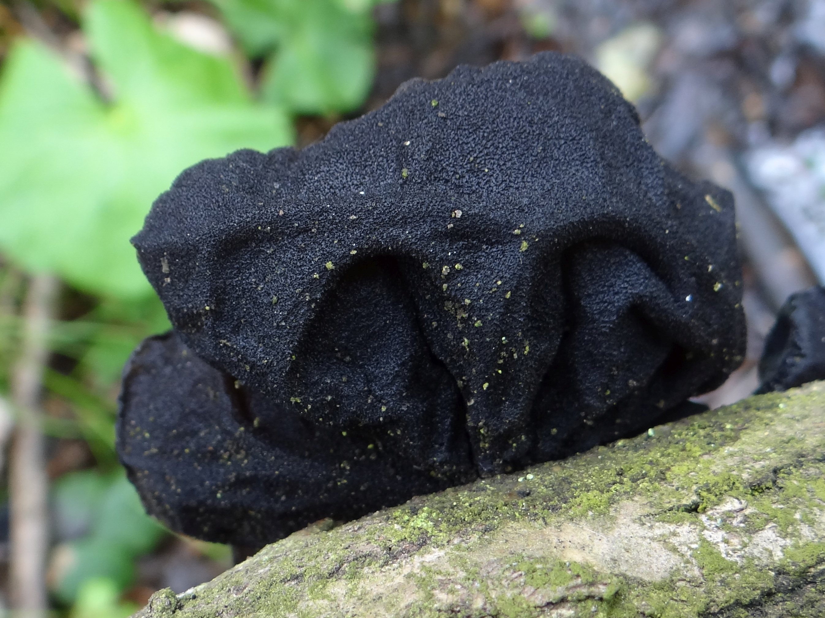 Exidia glandulosa (location: Poland, Cichawka, województwo małopolskie)